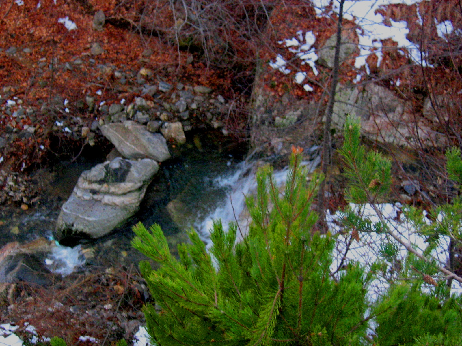 Буреска река